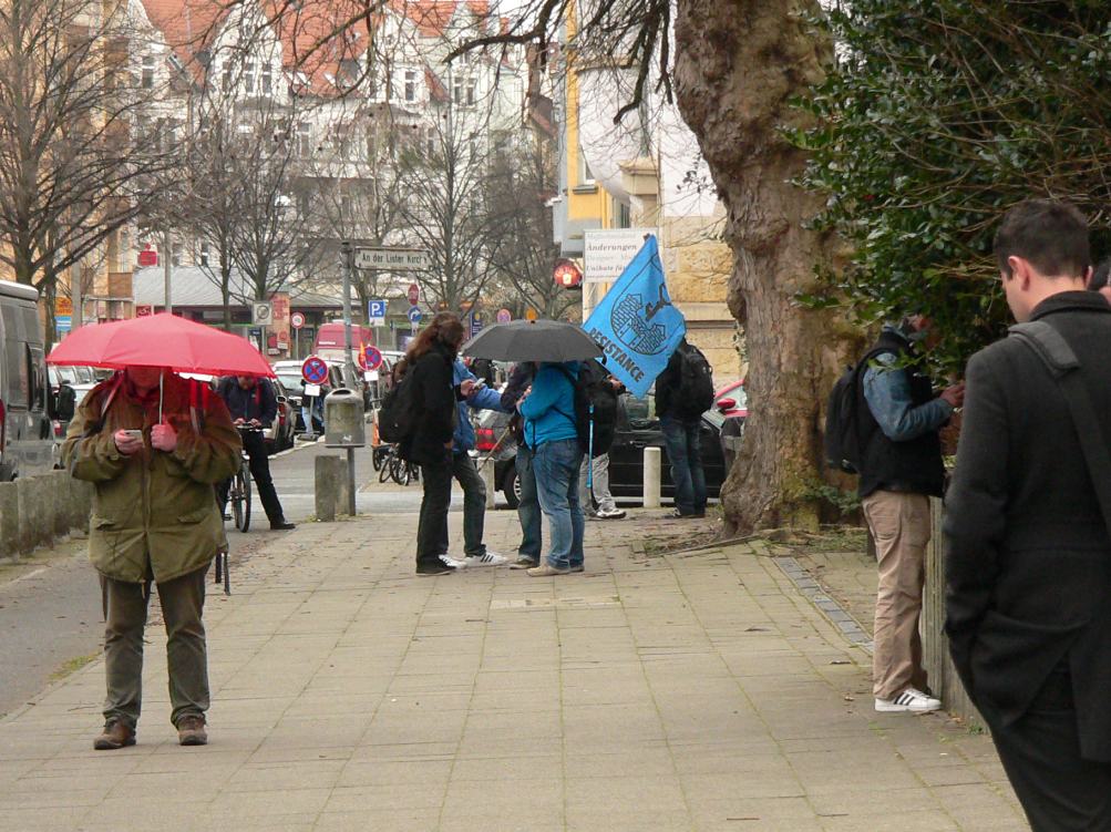 Ingress Spieler in Hannover